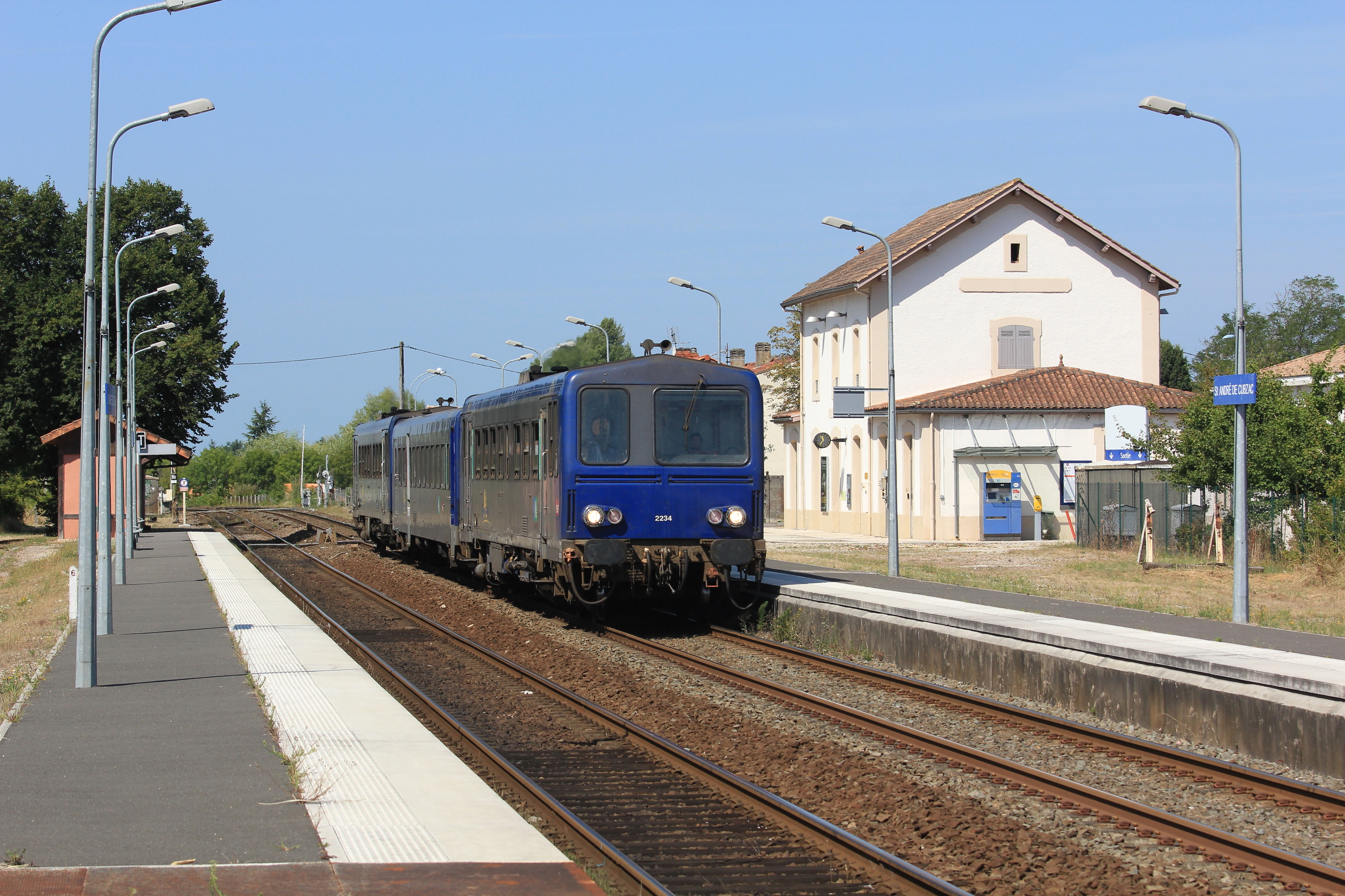 L'X 2234, une XR 6000 et un autre X 2200 desservent la gare de Saint-André-de-Cubzac sur le TER 865122 (Bordeaux-Saint-Jean - Saint-Mariens - Saint-Yzan).